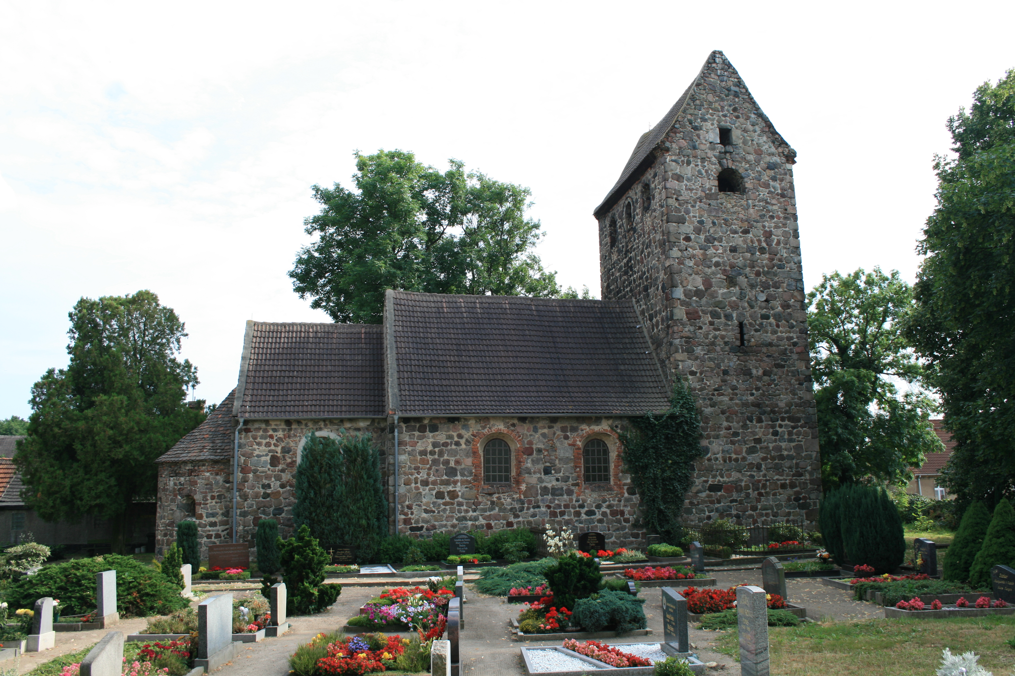 Nordansicht der Kirche in Groß Lübars